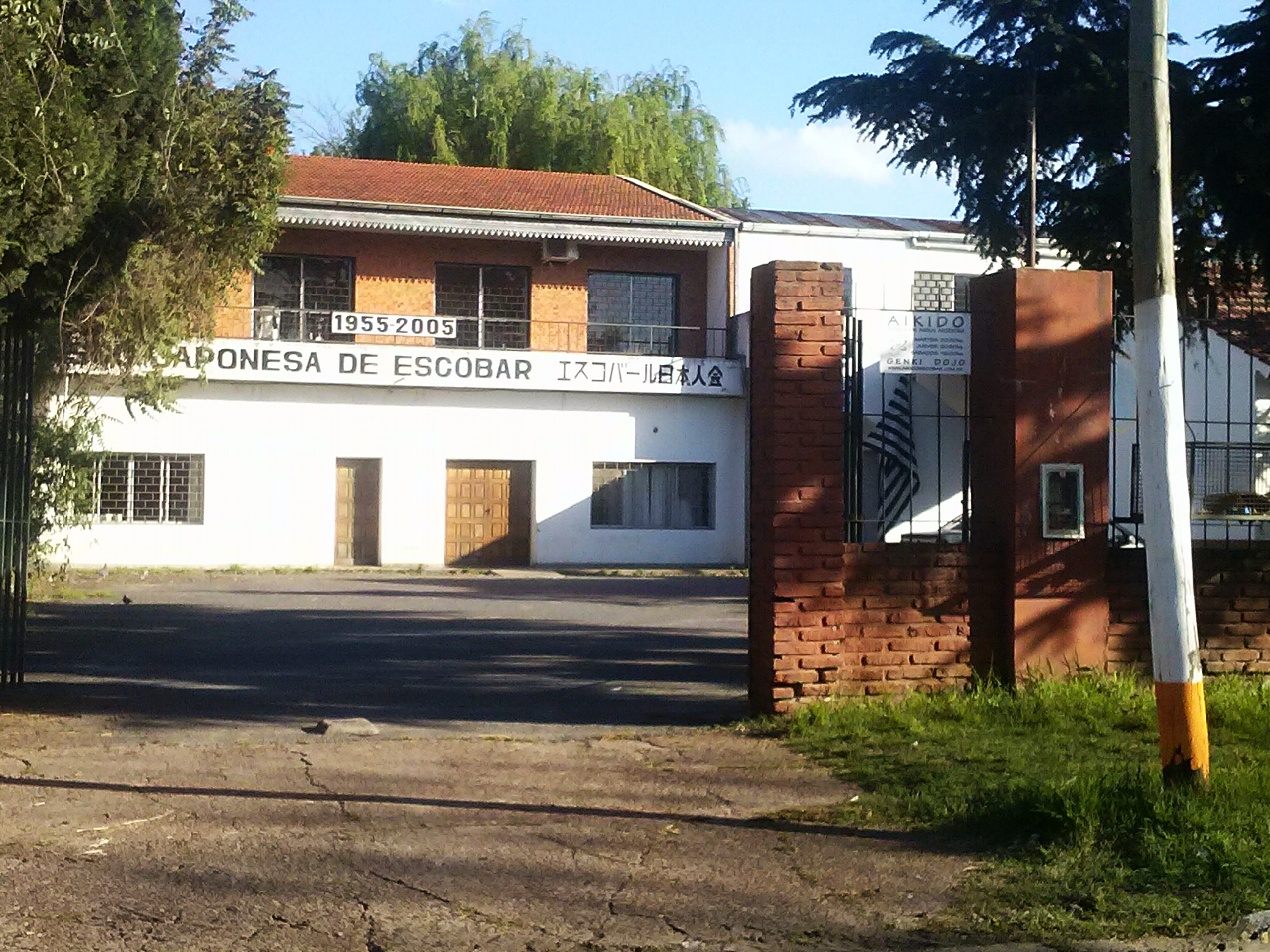 Asociación Japonesa en Belén de Escobar, Partido de Escobar, Provincia de Buenos Aires, Argentina.